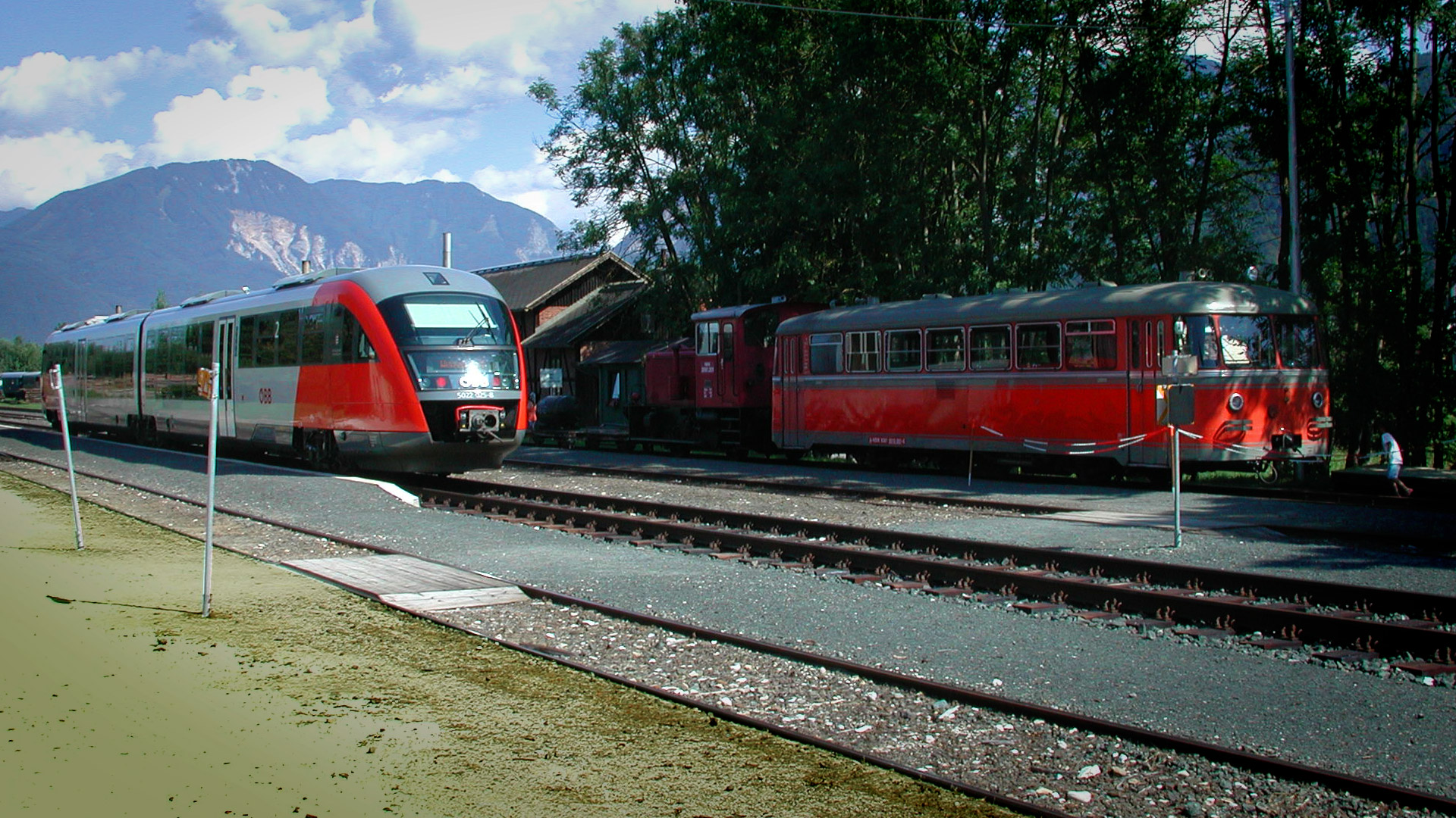 Bahnhof Weizelsdorf, Gegenwart und vergangenheit der Nebenbahnen, links die Schnellbahnlinie S3 und rechts ein Schienenbus aus den 1950er Jahren, der NBiK.